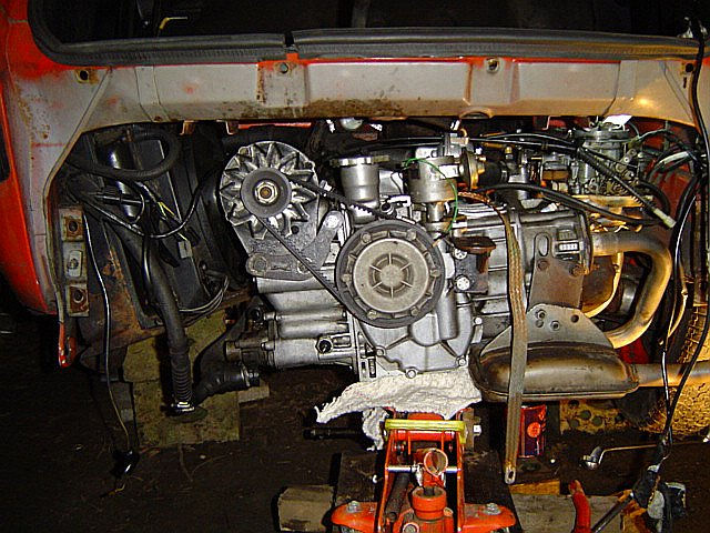 Motor eines Fiat 126 BIS selbst fotografiert